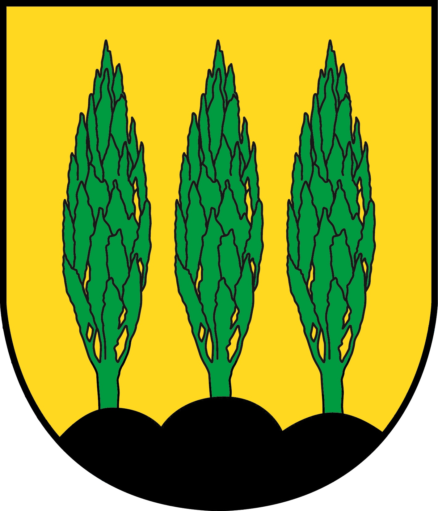 Das Wappen wurde am 6. September 1579 von Erzherzog Karl II. von Innerösterreich bestätigt. Das Wappen entspricht dabei einem schon zuvor verwendeten Siegel. Die Wiederverleihung erfolgte mit Wirkung vom 1. Jänner 2016. Das Wappen der Marktgemeinde Eibiswald ist ein (nach alten Vorstellungen von der Namensherkunft) sprechendes Wappen und zeigt einen gelben Schild mit drei grünen Eibenbäumen auf drei erd- oder aschenfarbenen Büheln (mittelhochdeutsche Bezeichnung für Hügel oder Anhöhe).